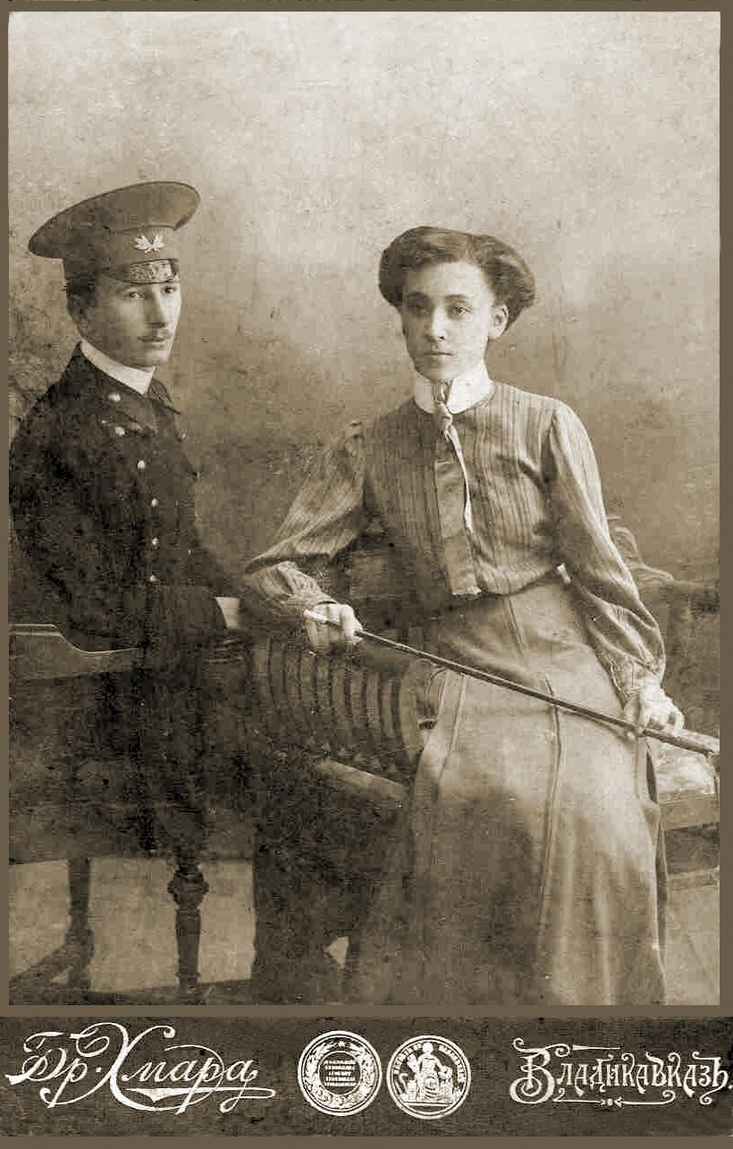 Бацко Цаликов, отец скульптора, с Айсетой Данилбековной Цаликовой